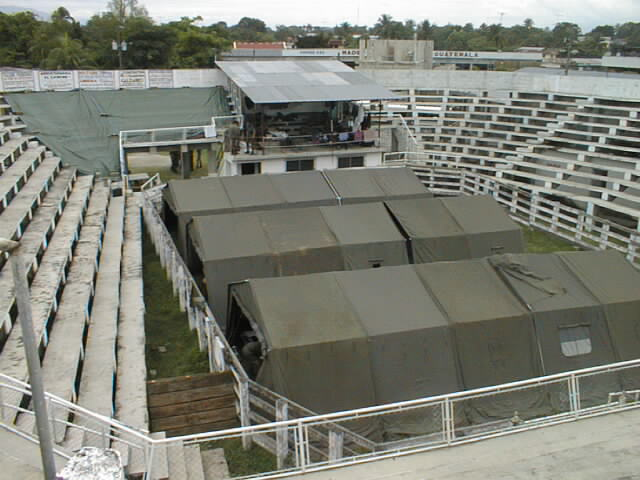 Base avancée du RSMA de Martinique dans les arènes municipales de Morales (Guatémala) - Novembre 1998